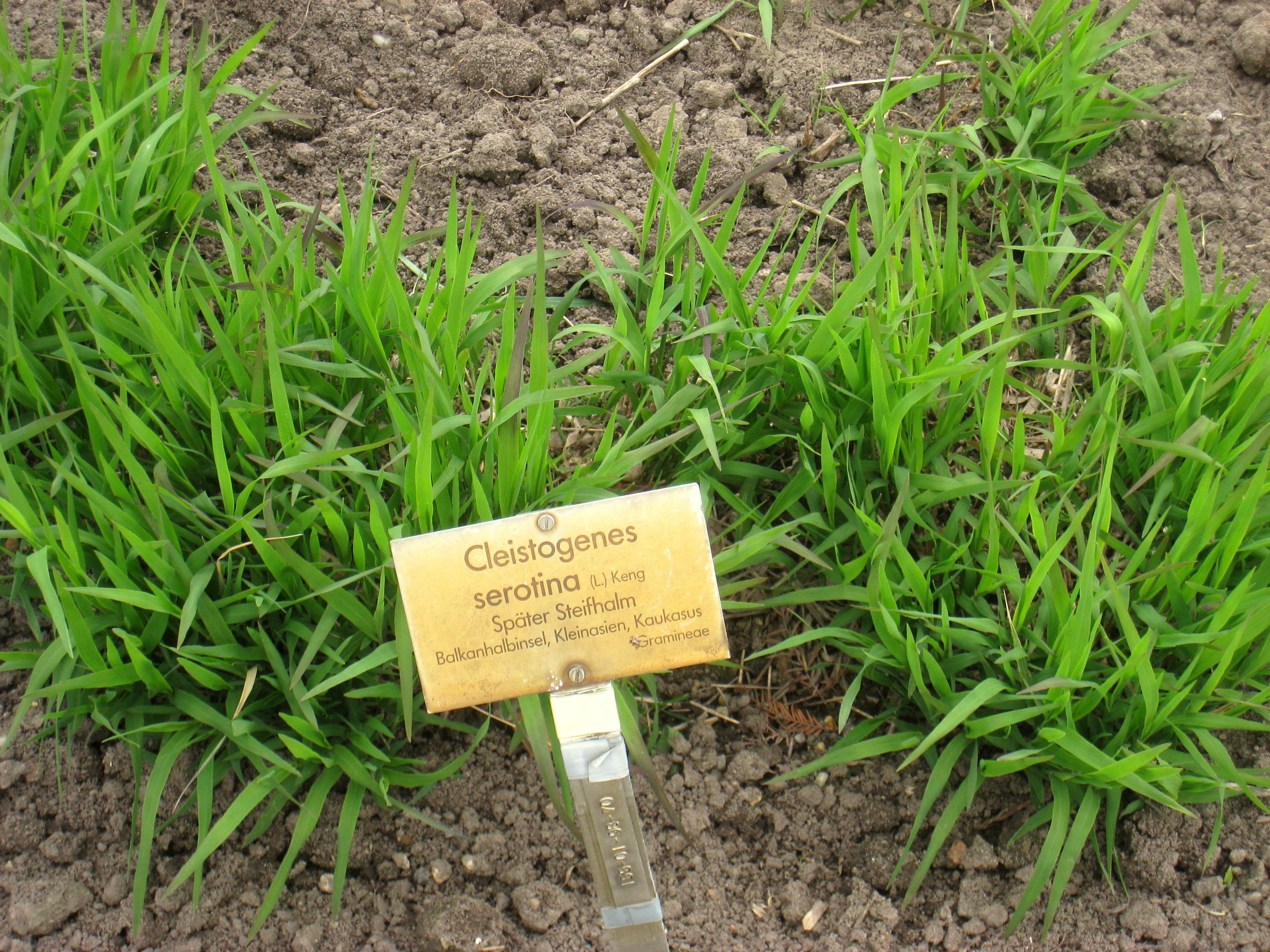 Cleistogenes serotina specimen in the Botanischer Garten, Berlin-Dahlem (Berlin Botanical Garden), Berlin, Germany.